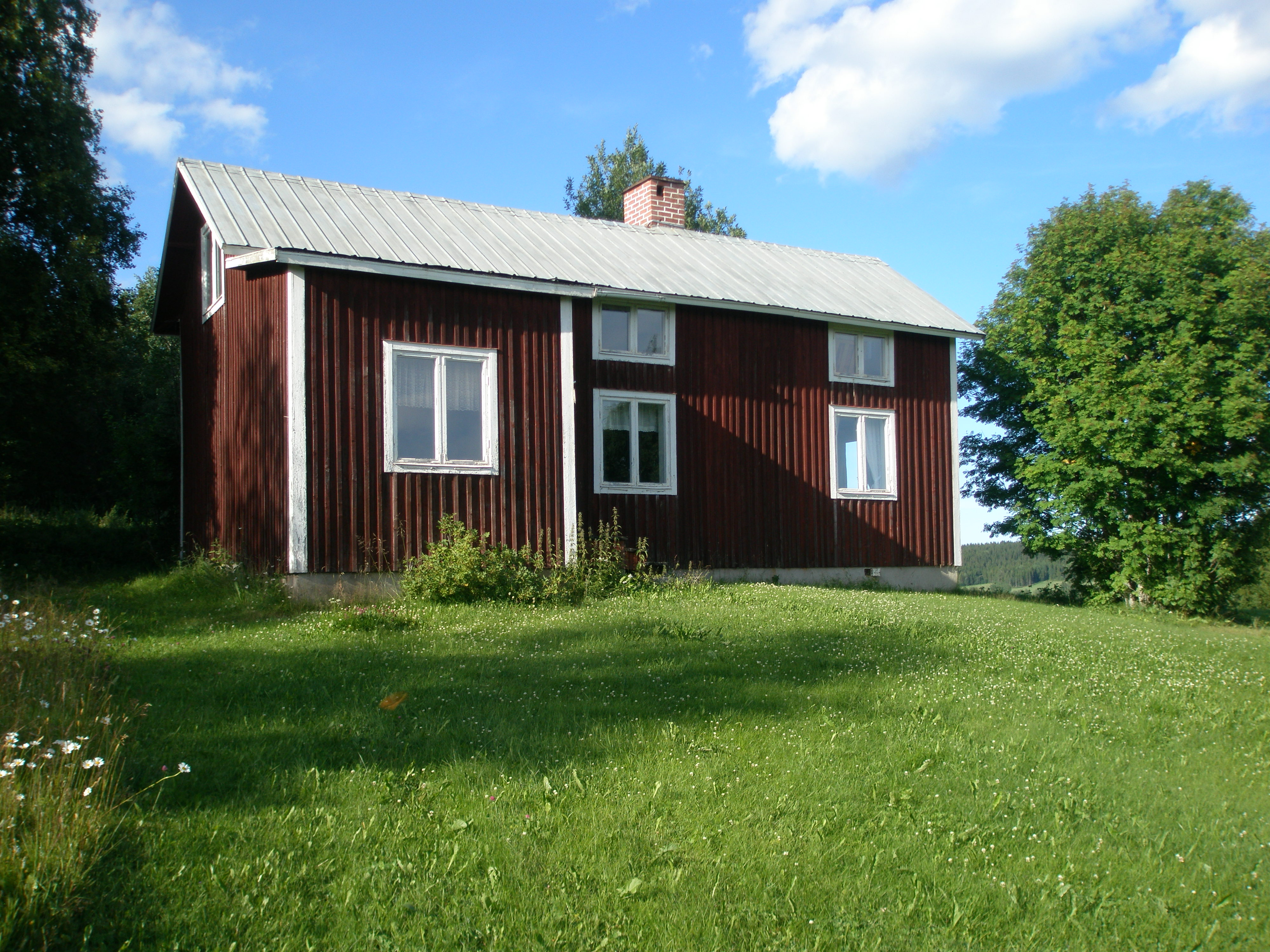 LappNilstorpet i Önet, Offerdals socken, Krokoms kommun, Jämtland, Sverige.